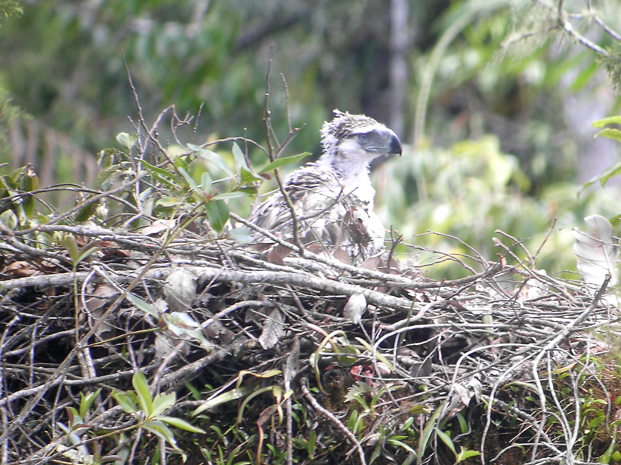 Philippine Eagle at nest